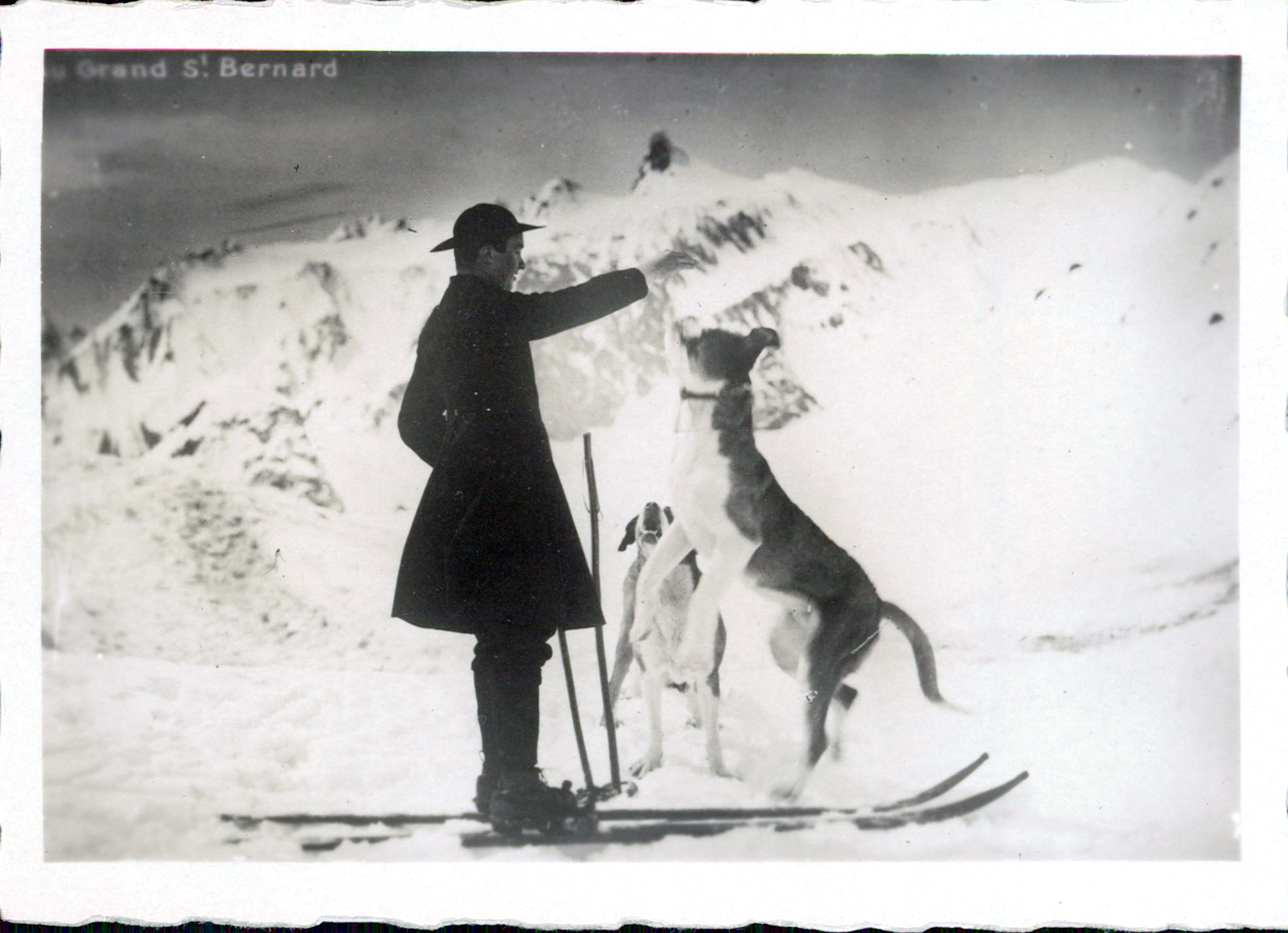 Aufnahme vom Hospiz auf dem Grossen Sankt Bernhard